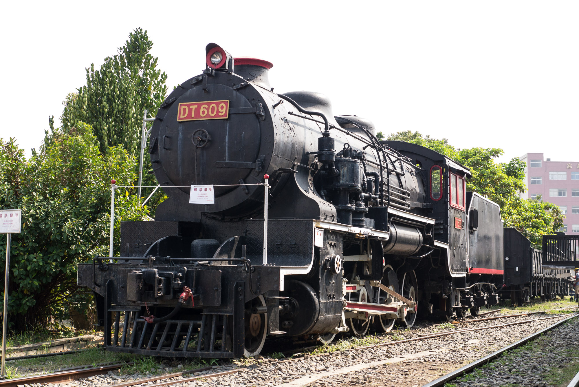 DT609